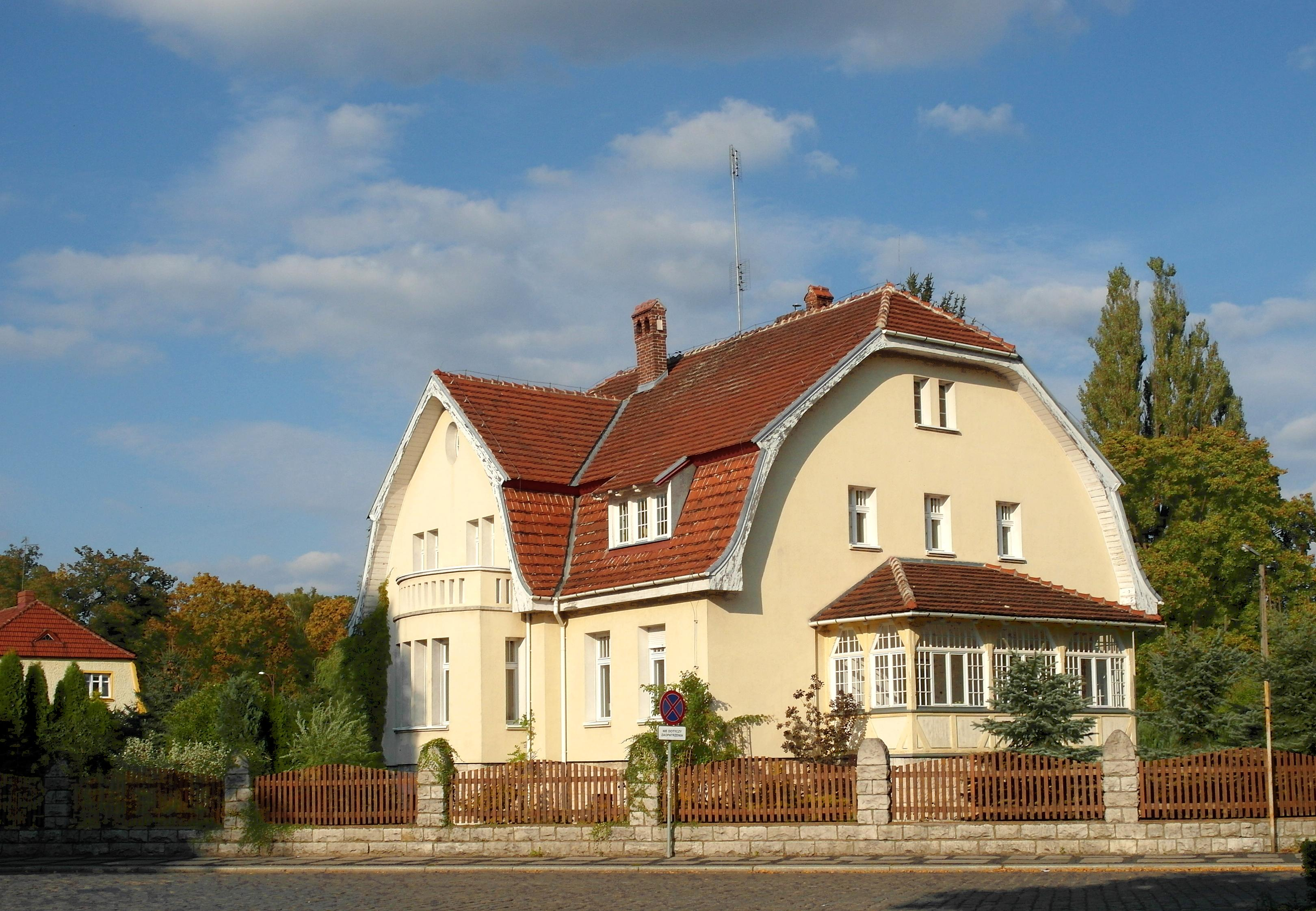 Willa fabrykancka z przełomu XIX i XX wieku w Dębnie